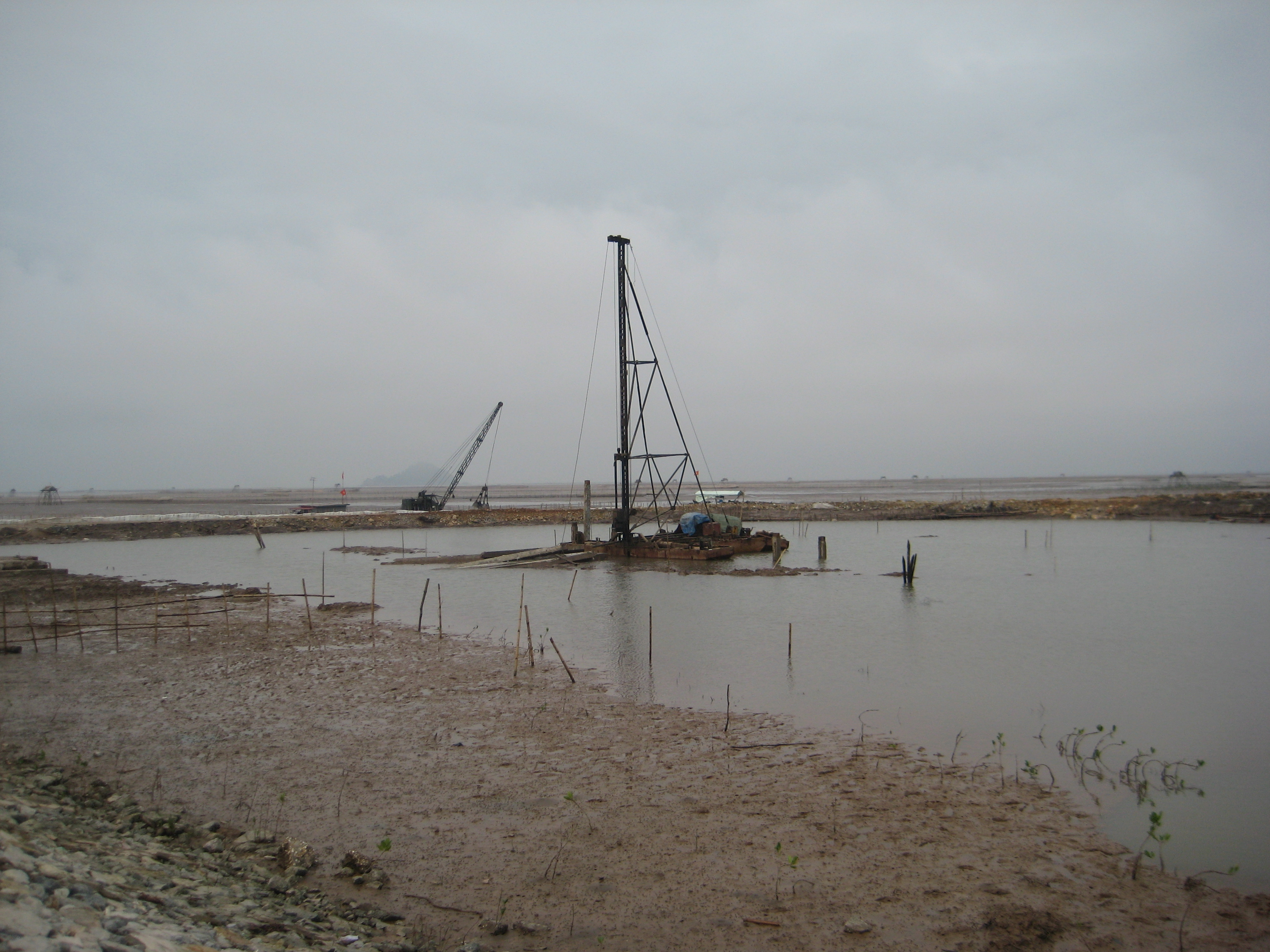 Vùng bãi ngang ven biển cửa sông Đáy thuộc huyện Kim Sơn tỉnh Ninh Bình, nơi đây được Unessco công nhận khu dự trữ sinh quyển thế giới (Khu dự trữ sinh quyển đồng bằng sông Hồng.